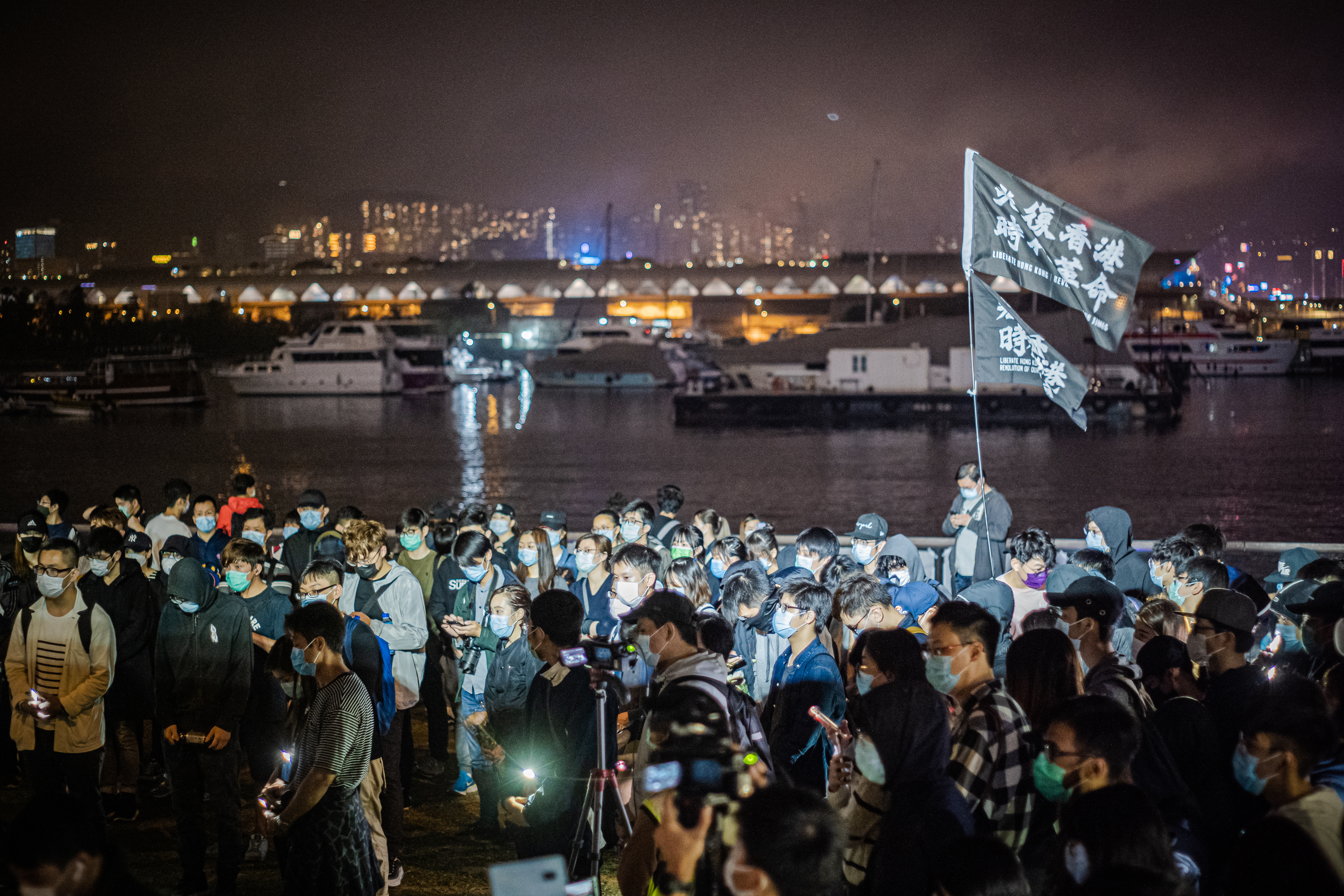 20200308-SDIM0440